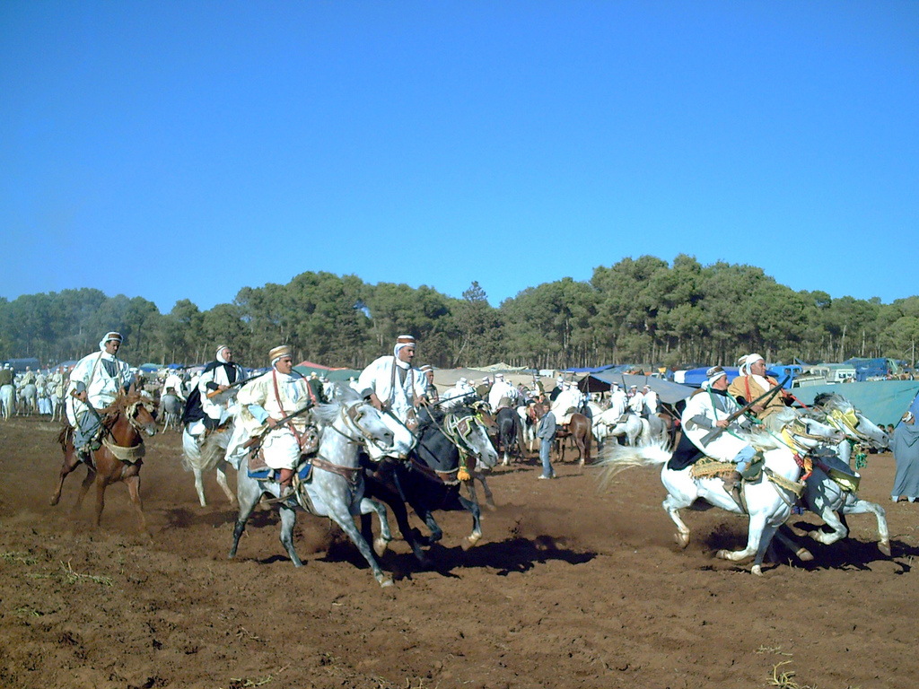 Fantasia Mostaganem 28-05-2008 (25) : l'arrivée pas terrible